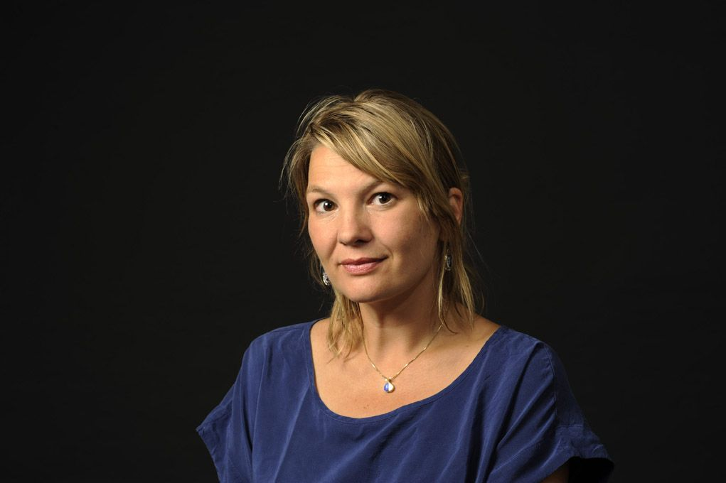 Eveline Crone, hoogleraar neurocognitieve ontwikkelingspsychologie aan de Universiteit Leiden (Foto Marc de Haan)